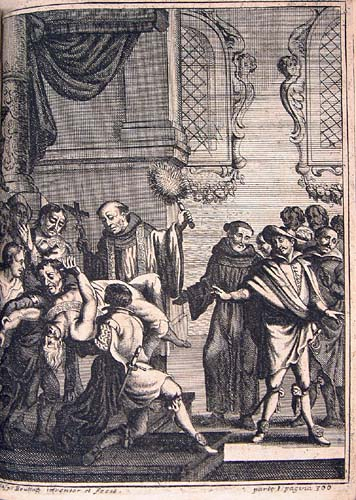 El alguacil alguacilado, Amberes, por Henrico y Cornelio Verdussen.